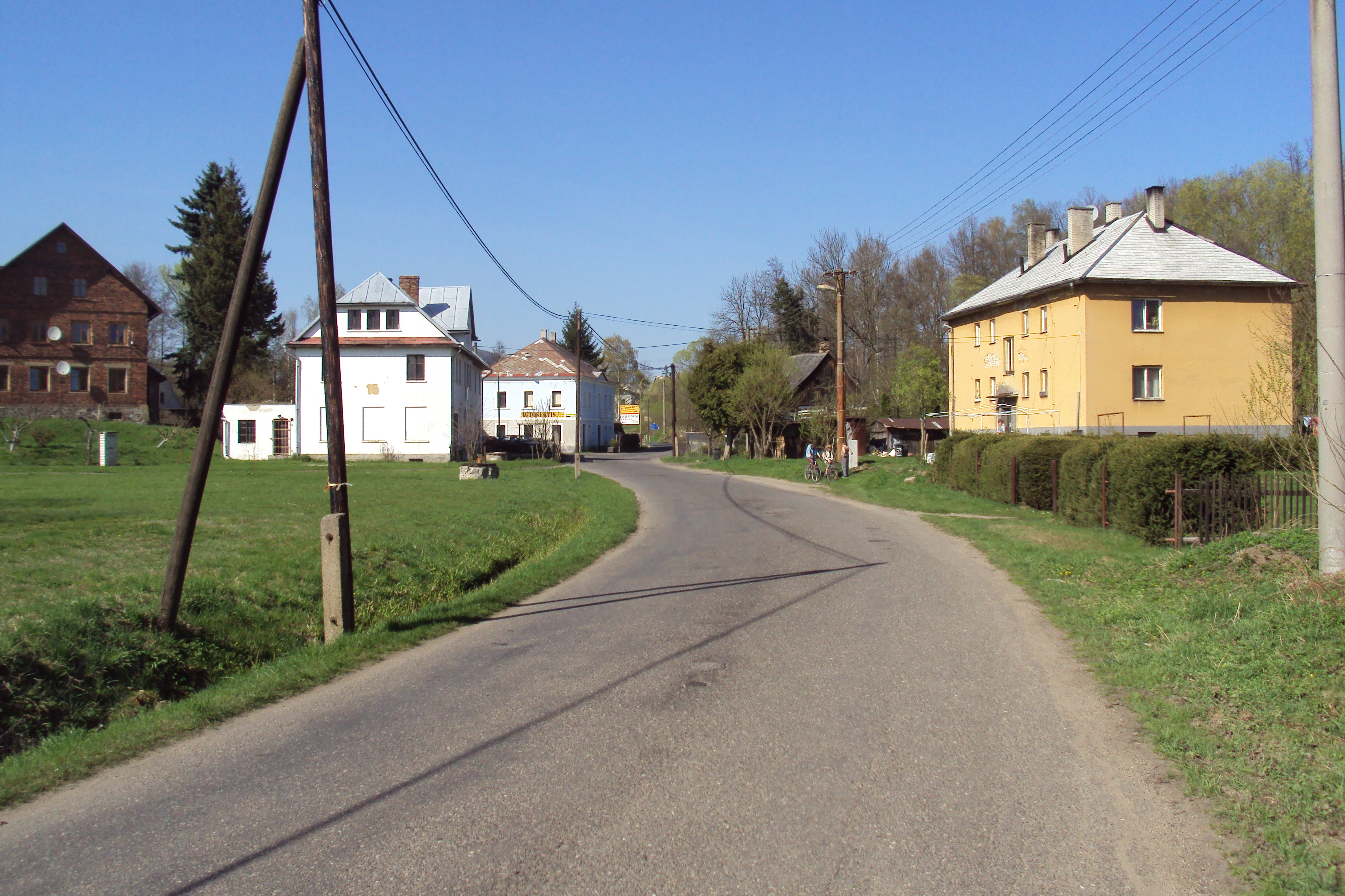 Domy v obci Lindava